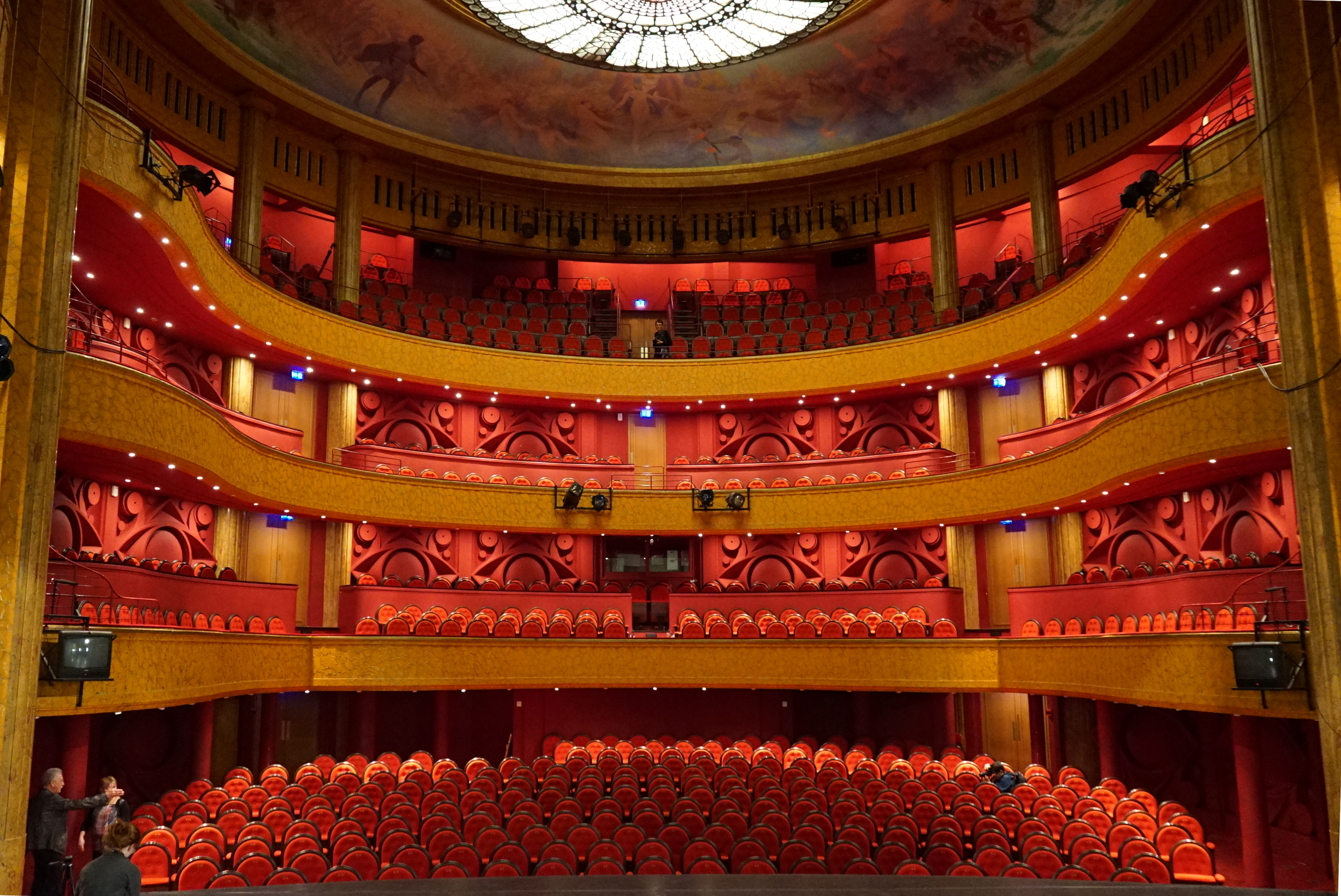 vue de l'Opéra.